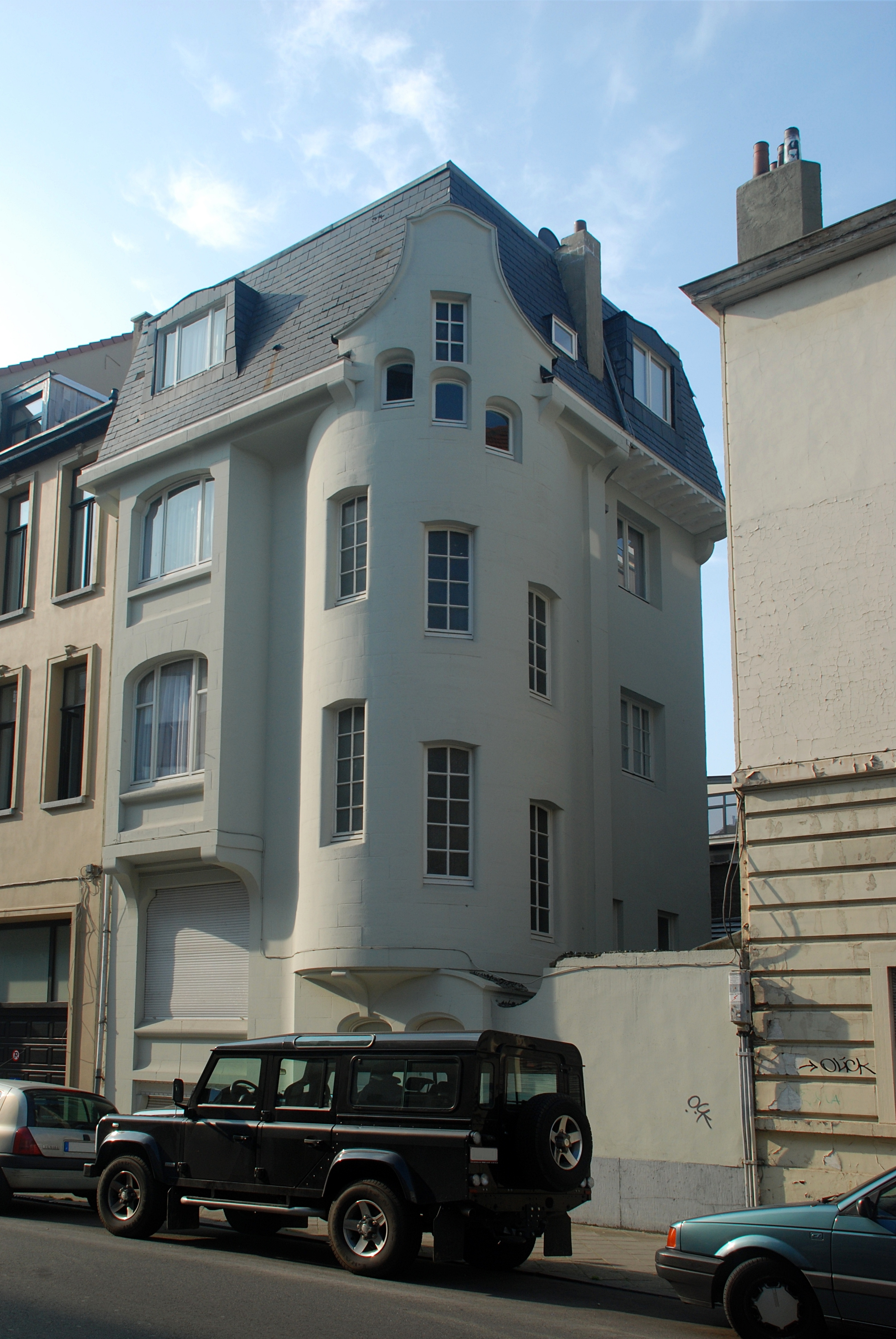 Belgique - Bruxelles - Maison Van Rysselberghe